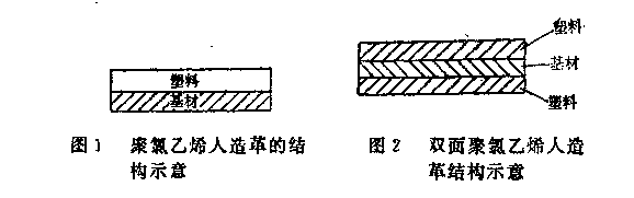 中文（中国大陆）: 聚氯乙烯人造革